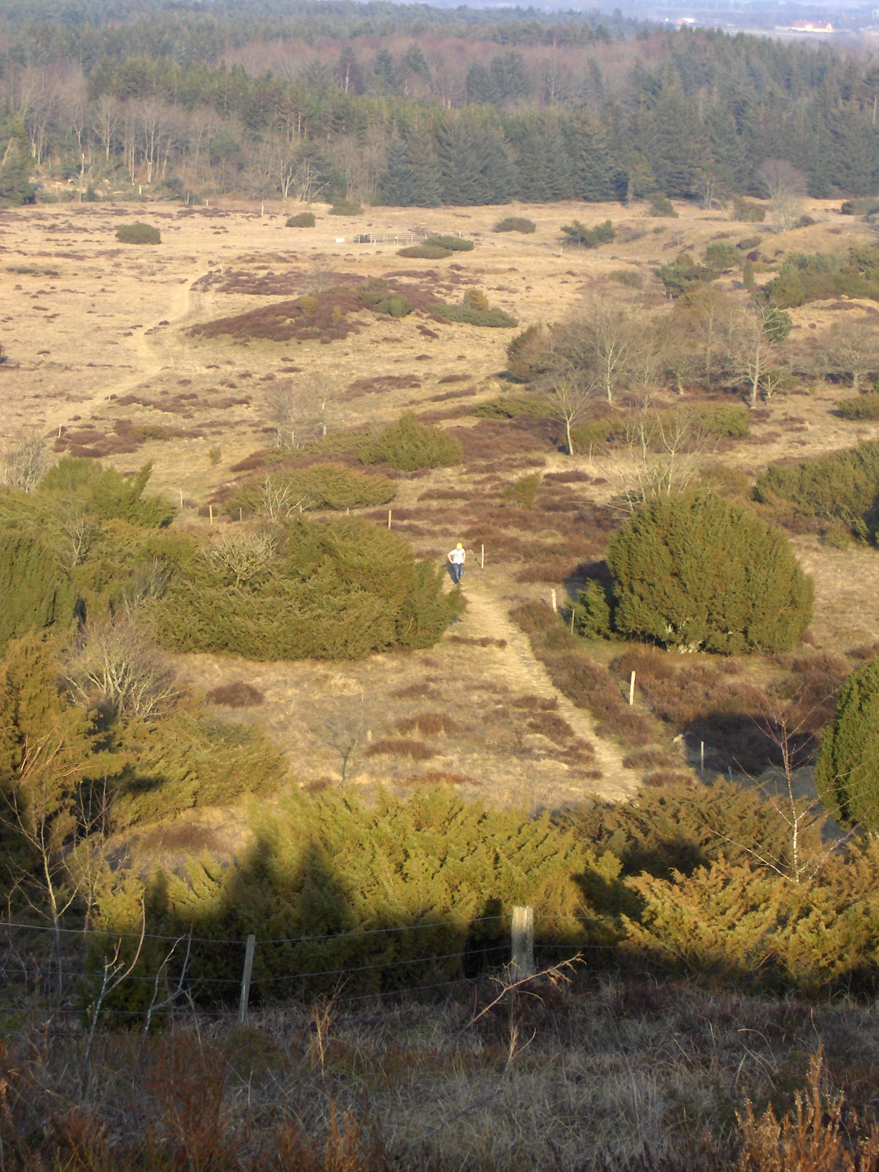 Hammer Bakker, en bakkeø i Nordjylland